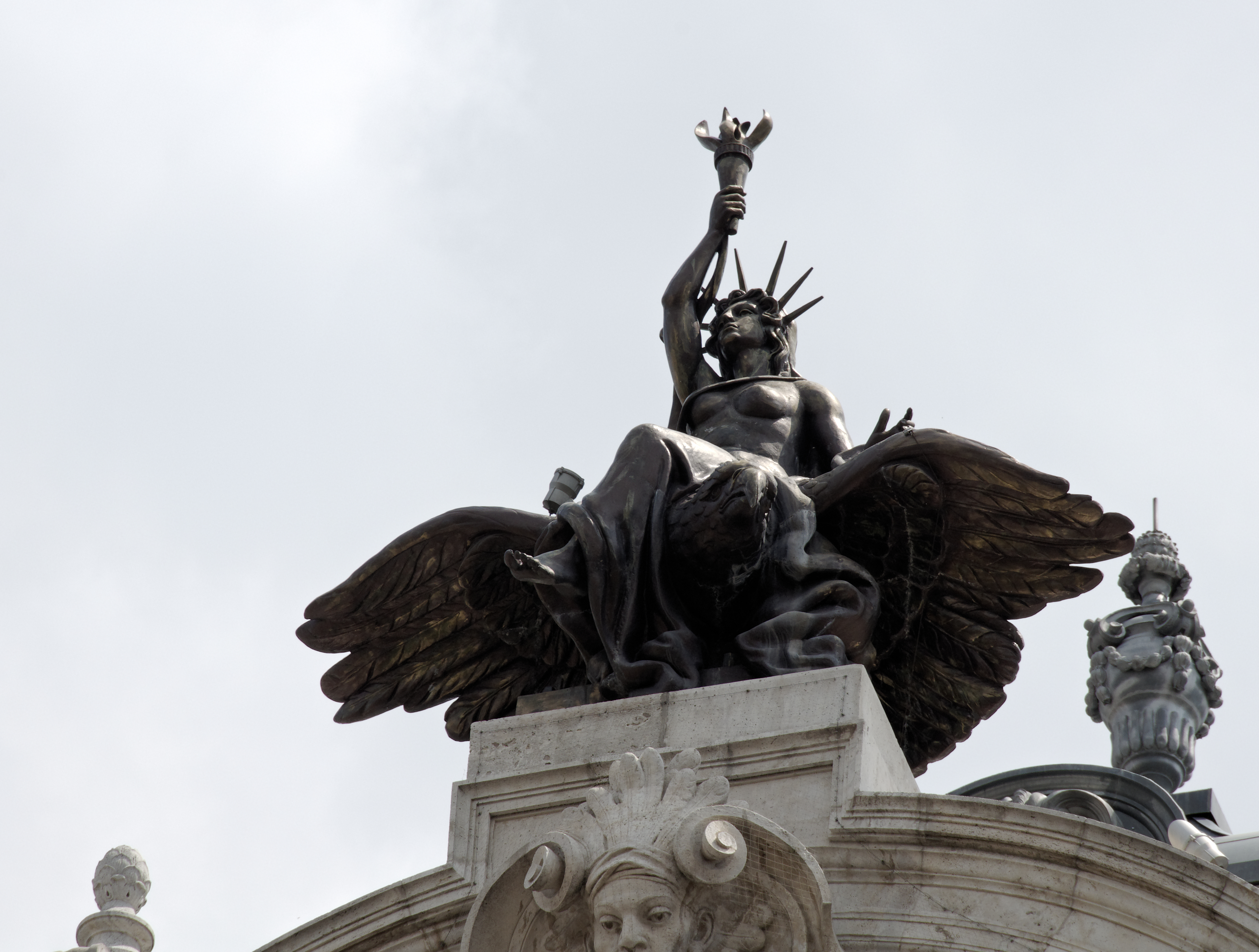 New York Palace, Budapest. Emblème historique de la New York Life Insurance Company qui fit construire le bâtiment et représentant la statue de la liberté assise sur l'aigle américain